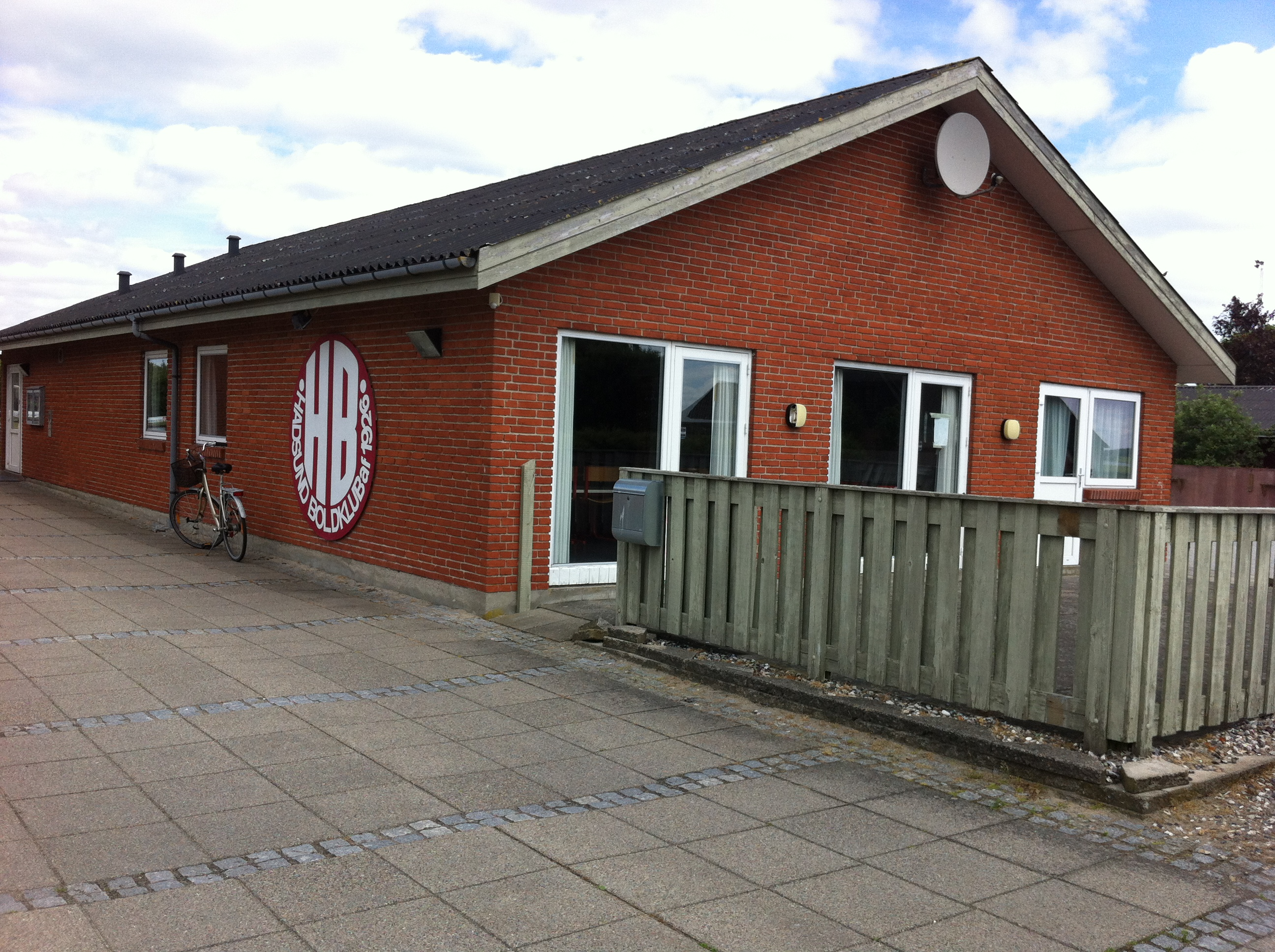 9560 Hadsund på Stadionvej